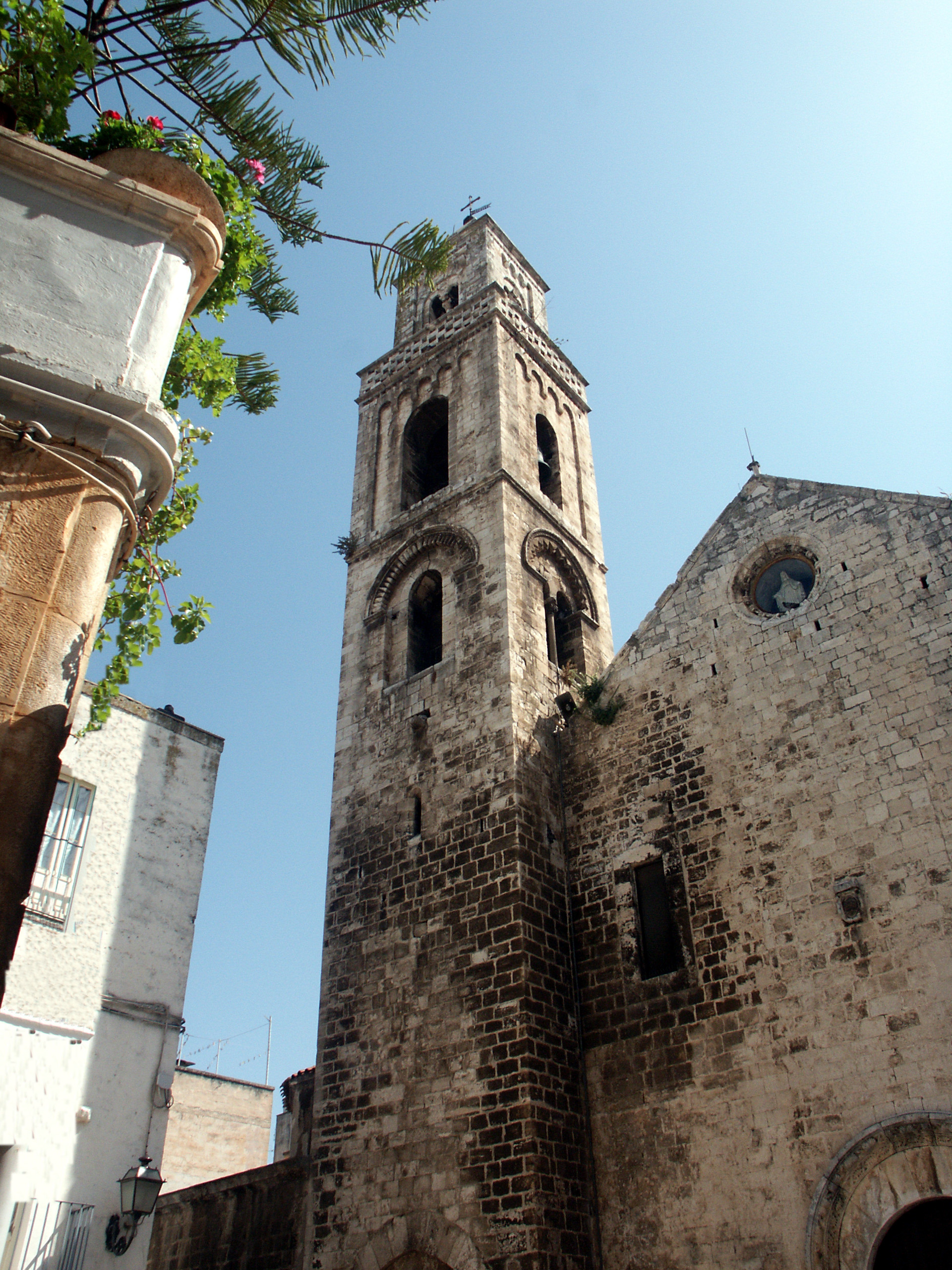 Collegiata di Santa Maria della Pace, chiesa madre di Noicattaro: parte della facciata e campanile.